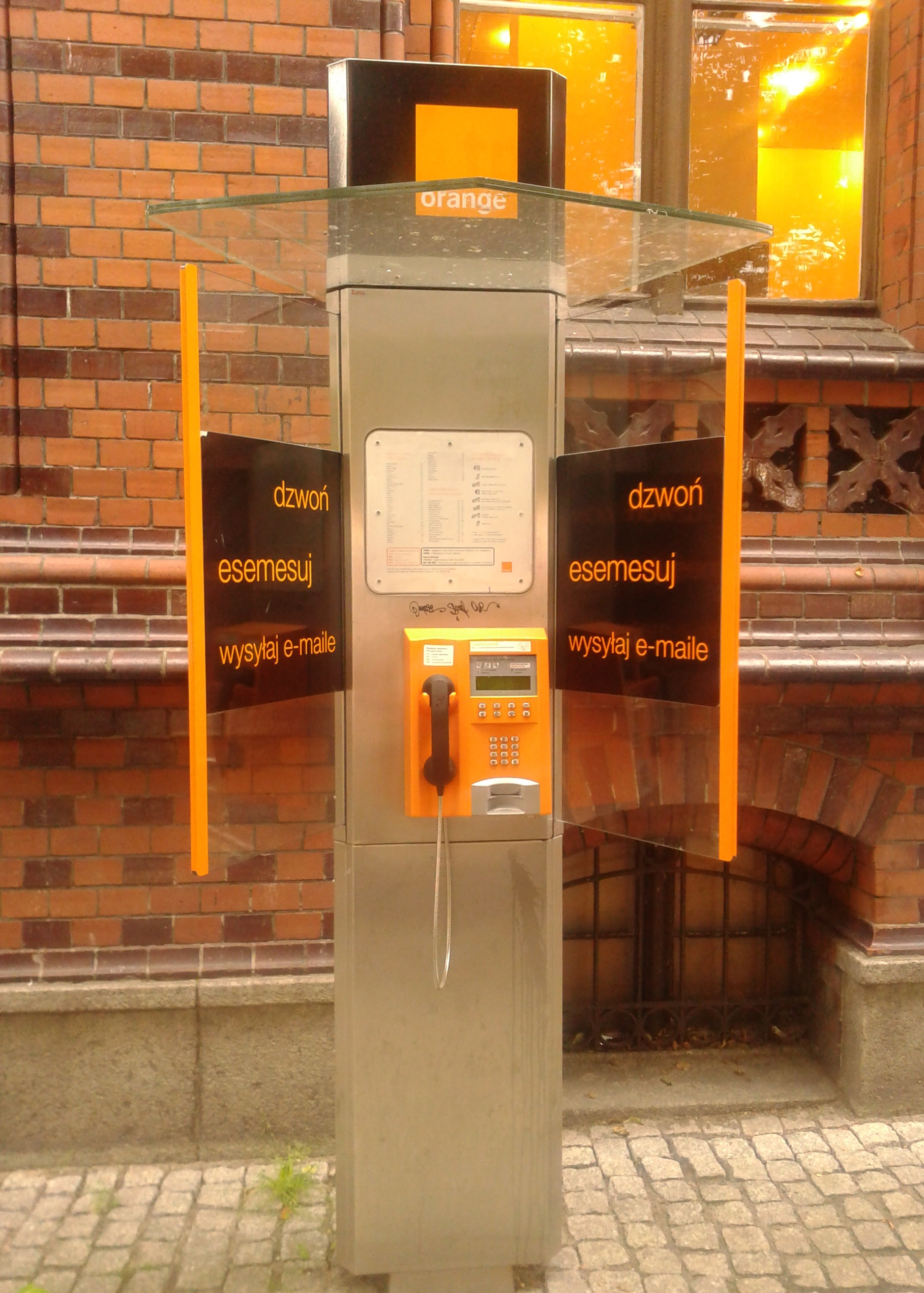 Automat telefoniczny przy Urzędzie Pocztowym nr 1 w Toruniu - Rynek Staromiejski 15